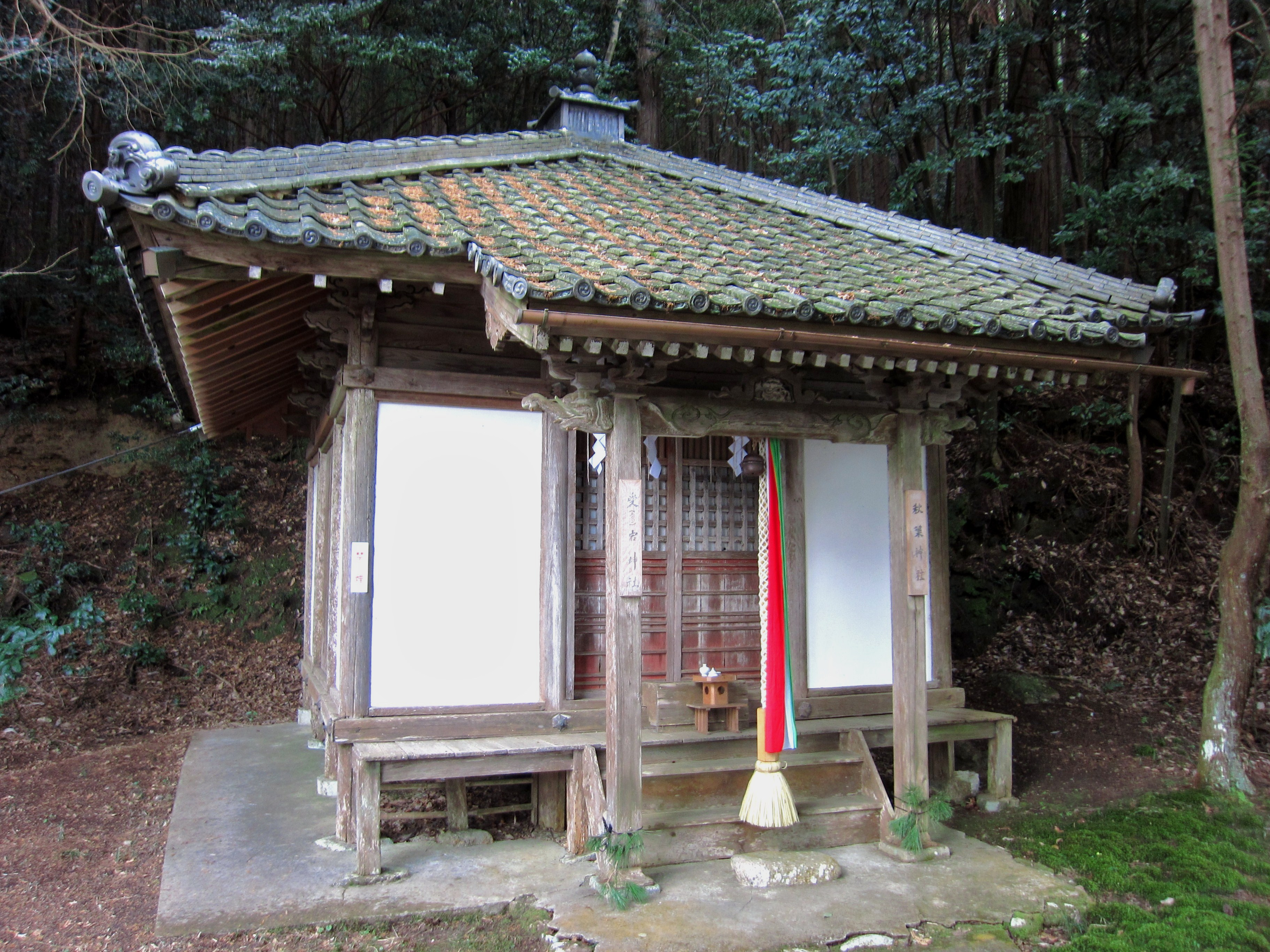 生身天満宮 境内社秋葉愛宕神社